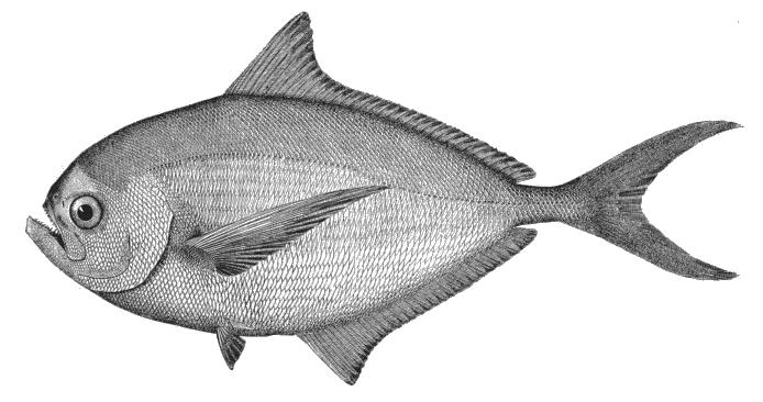 Brama brama (syn. Brama raji)